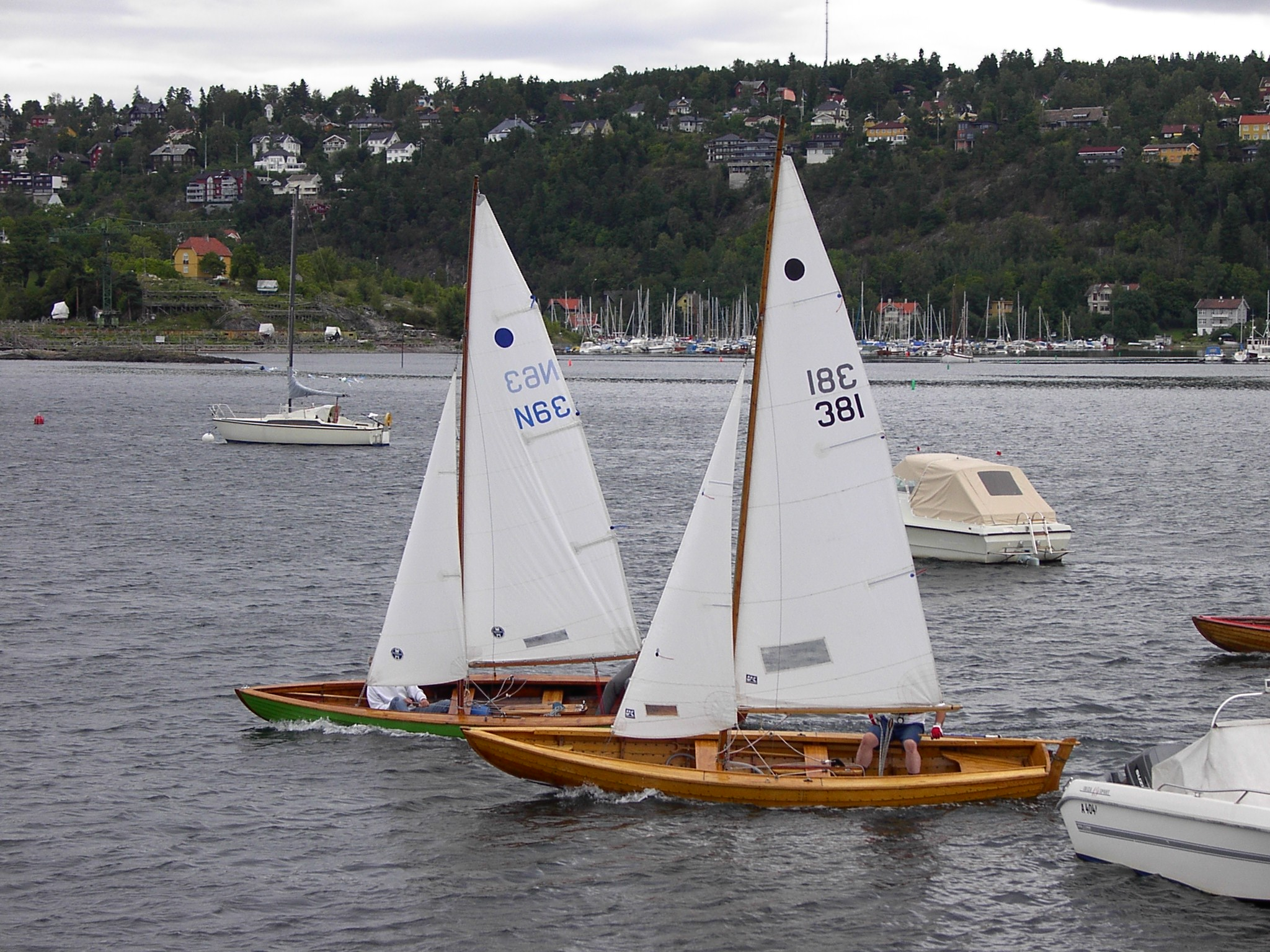 Two "Oslojoller"